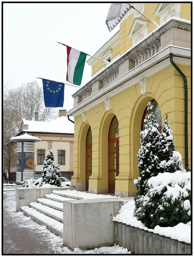 Nyíregyháza, 2008 első hó